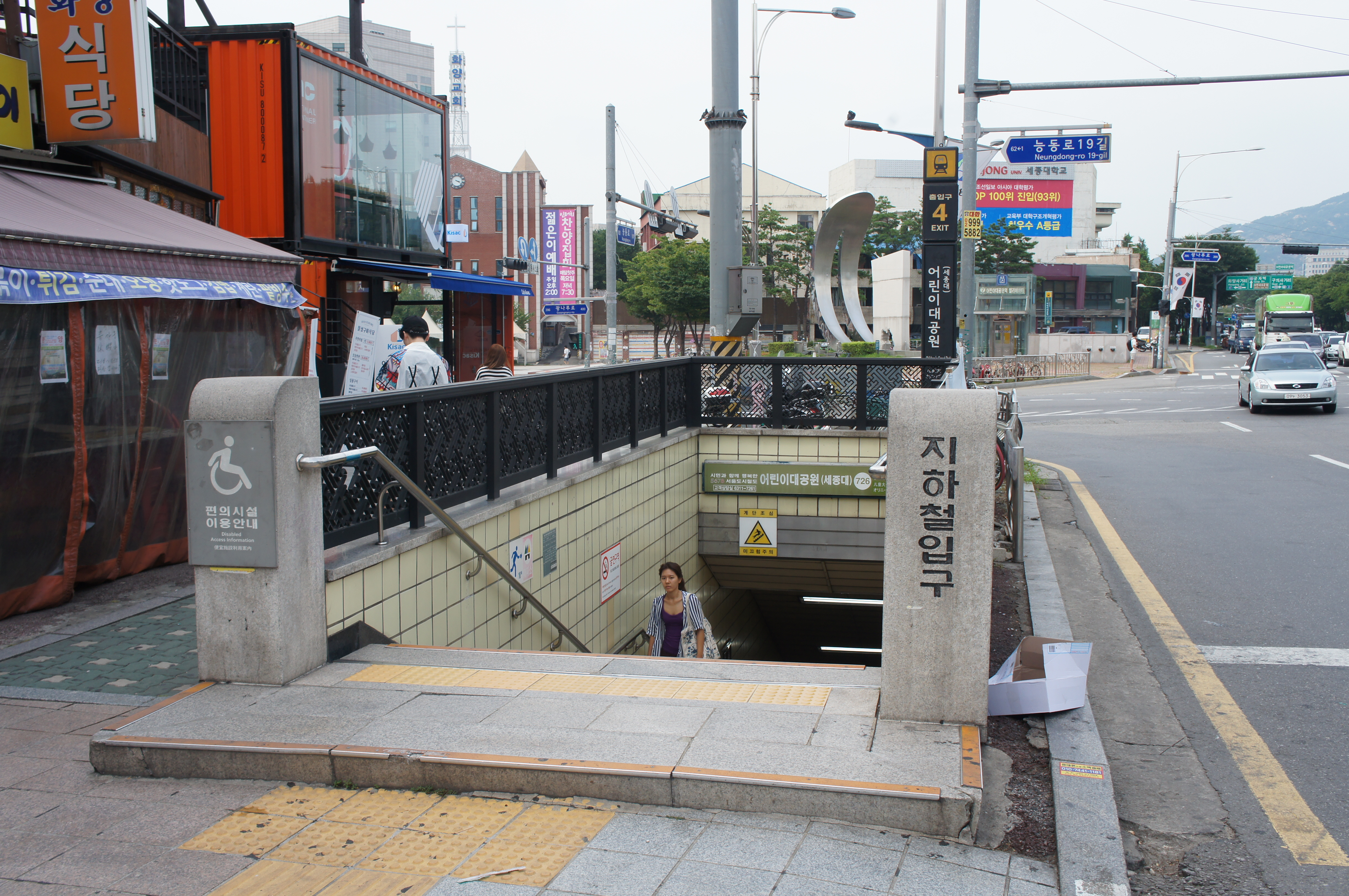 어린이대공원역 4번출구